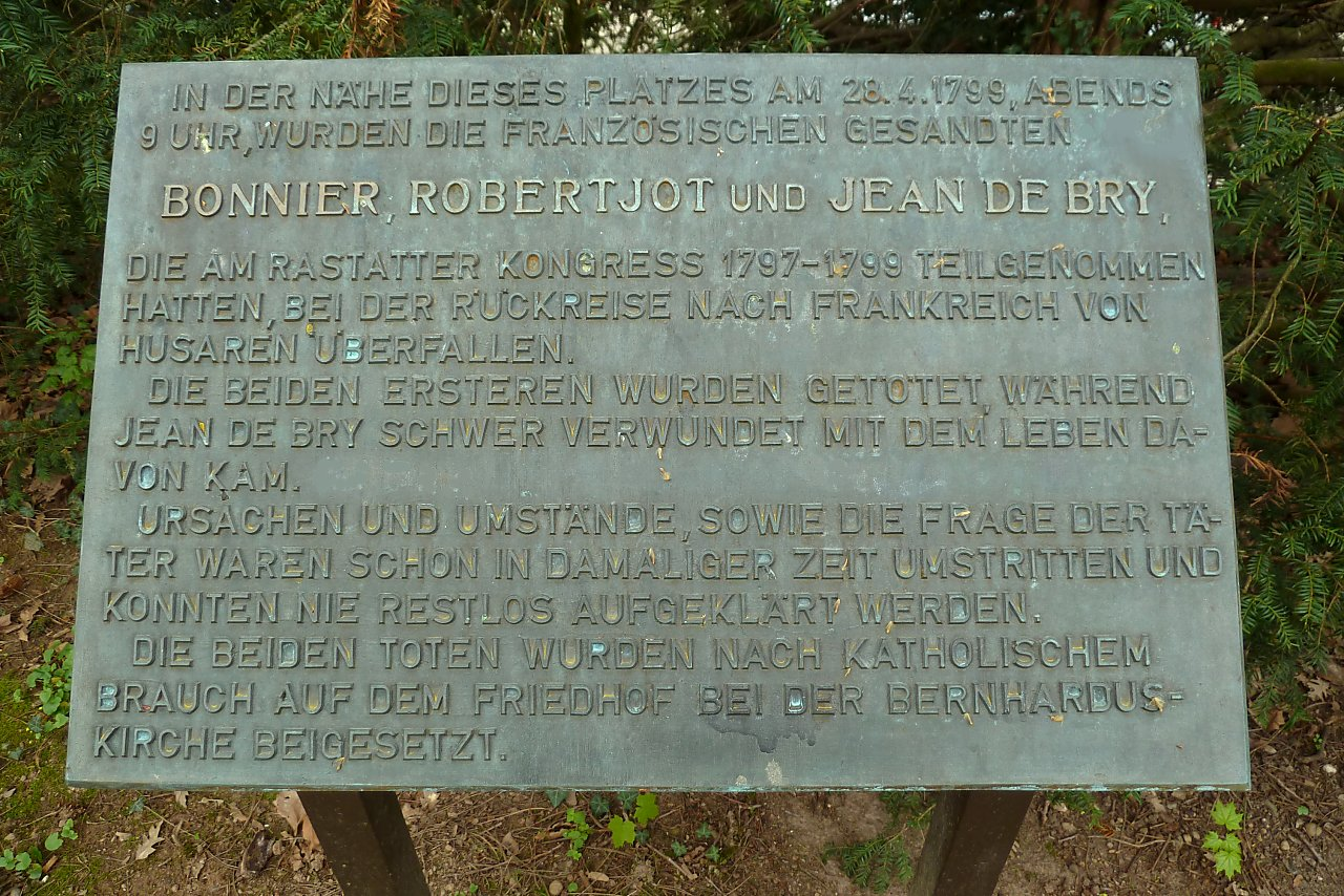 Gedenktafel an den Rastatter Gesandtenmord. Die Tafel befindet sich neben dem Gedenkstein in einem kleinen Park in der Nähe der Strassenkreuzung "Am Gedenkstein" und "Kinkelstrasse".